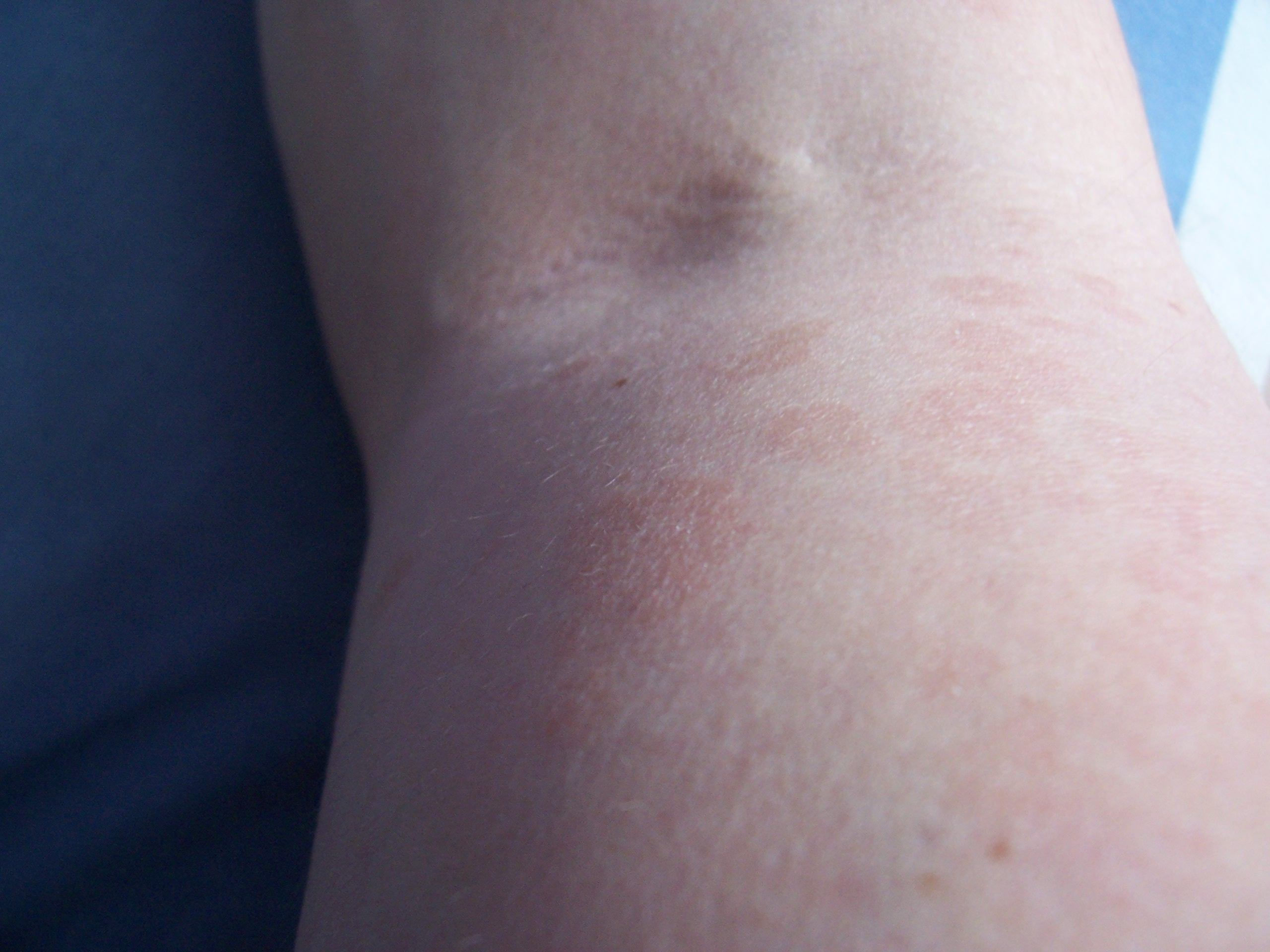 Pityriasis Versicolor (bicep)